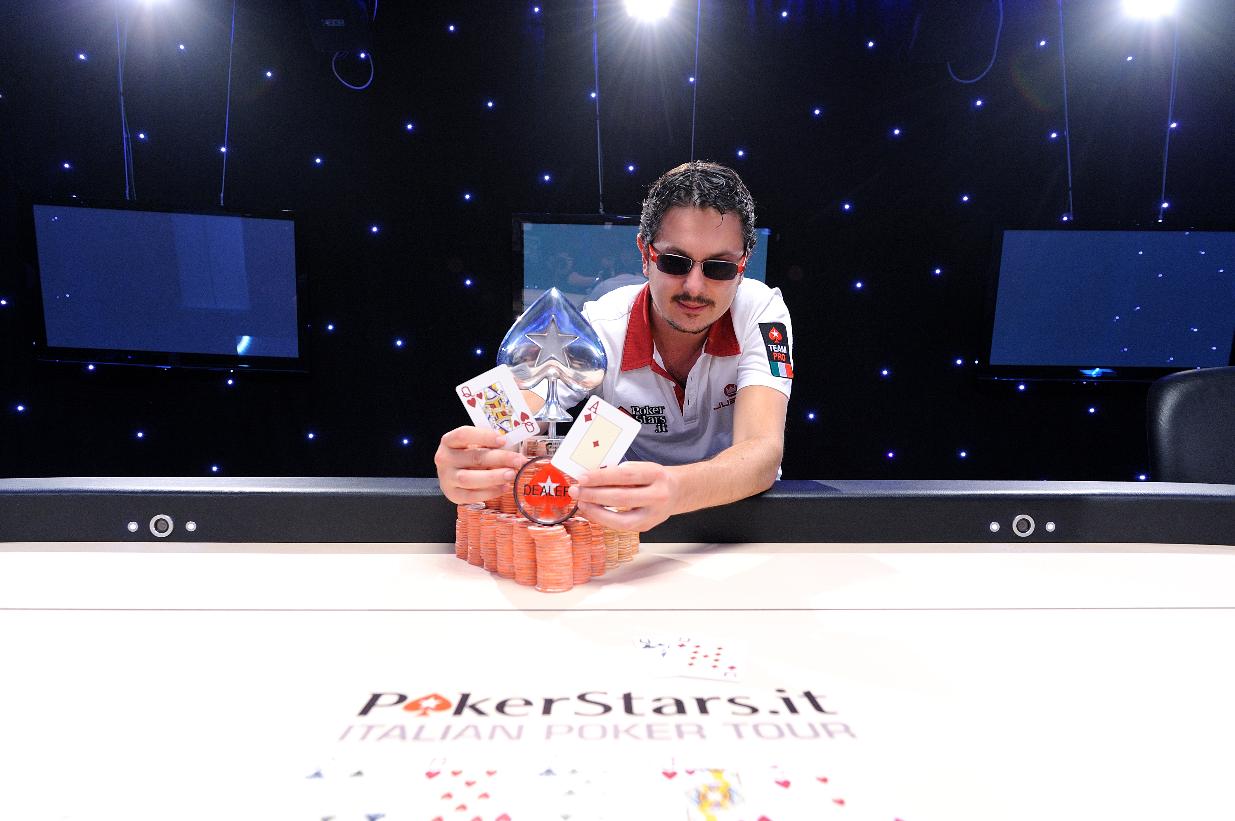 Luca Pagano con l'ambita picca di IPT Sanremo 2011